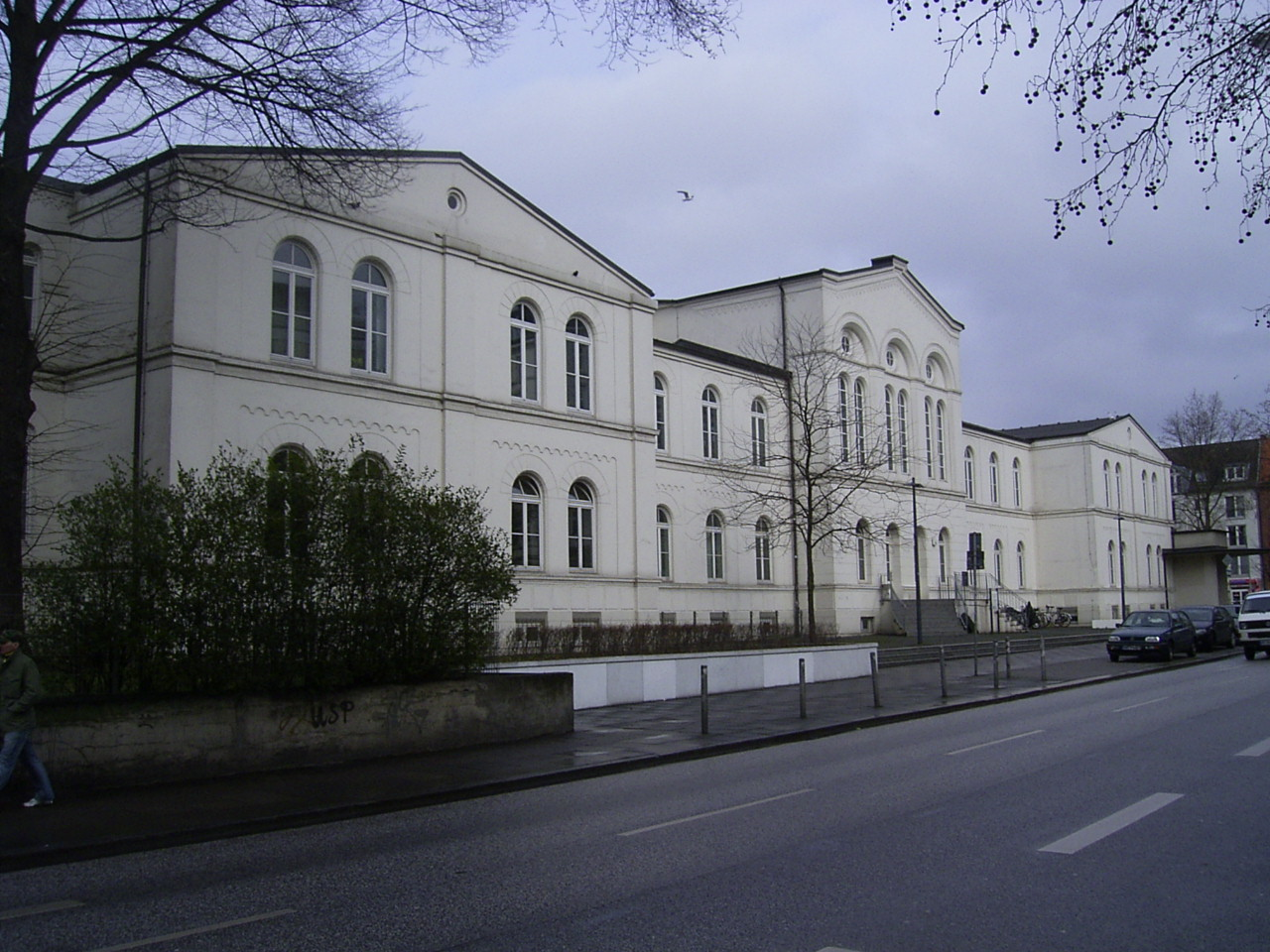 Das Deutsch-Israelitische Krankenhaus in St. Pauli ist eine Stiftung von Salomon Heine und wurde 1841 bis 1843 von Hinrich Klees-Wülbern erbaut. Von den Nationalsozialisten 1939 geschlossen, beherbergt das Gebäude heute die Ortsdienststelle St. Pauli. This is a photograph of an architectural monument.